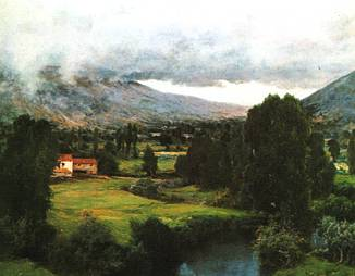 Paisaje campurriano